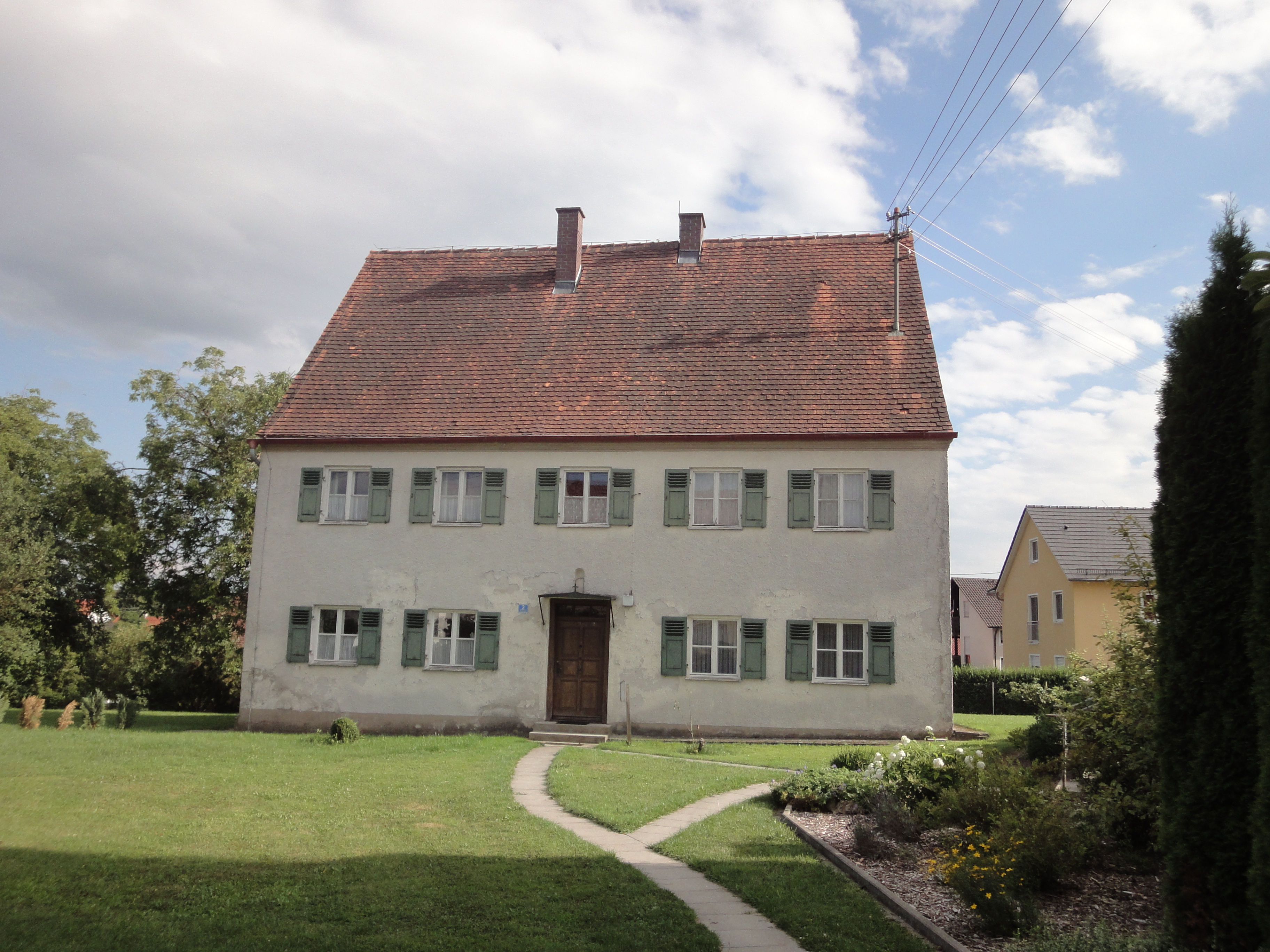 zweigeschossiger Satteldachbau, erbaut 1709/10, erneuert um 1860/70